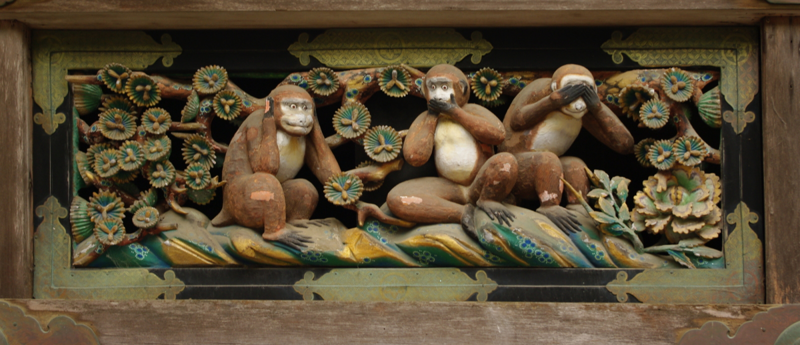 Die 3 Affen (nichts Böses hören, nichts Böses sagen, nichts Böses sehen) am heiligen Stall im Tosho-gu